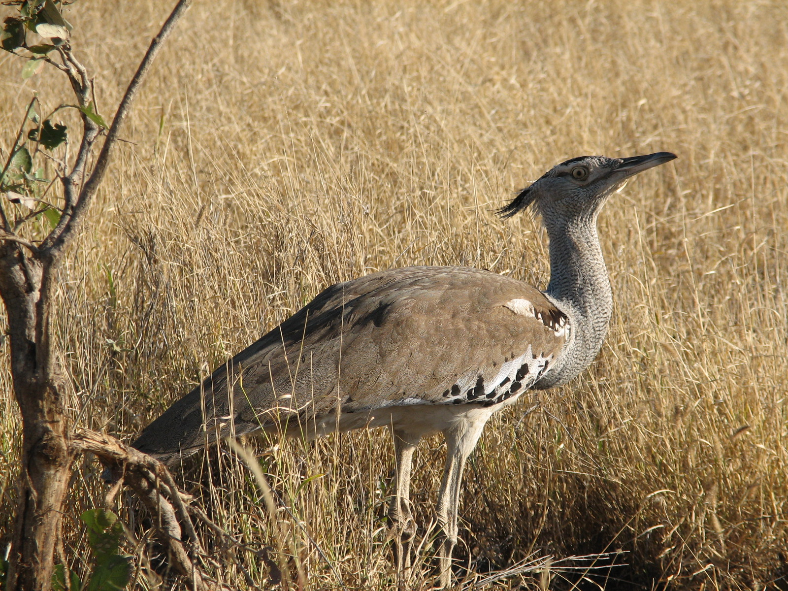 Ardeotis kori - Photo taken in the Kruger National Park near the Tsendze river (Afrikaans - Gompou)